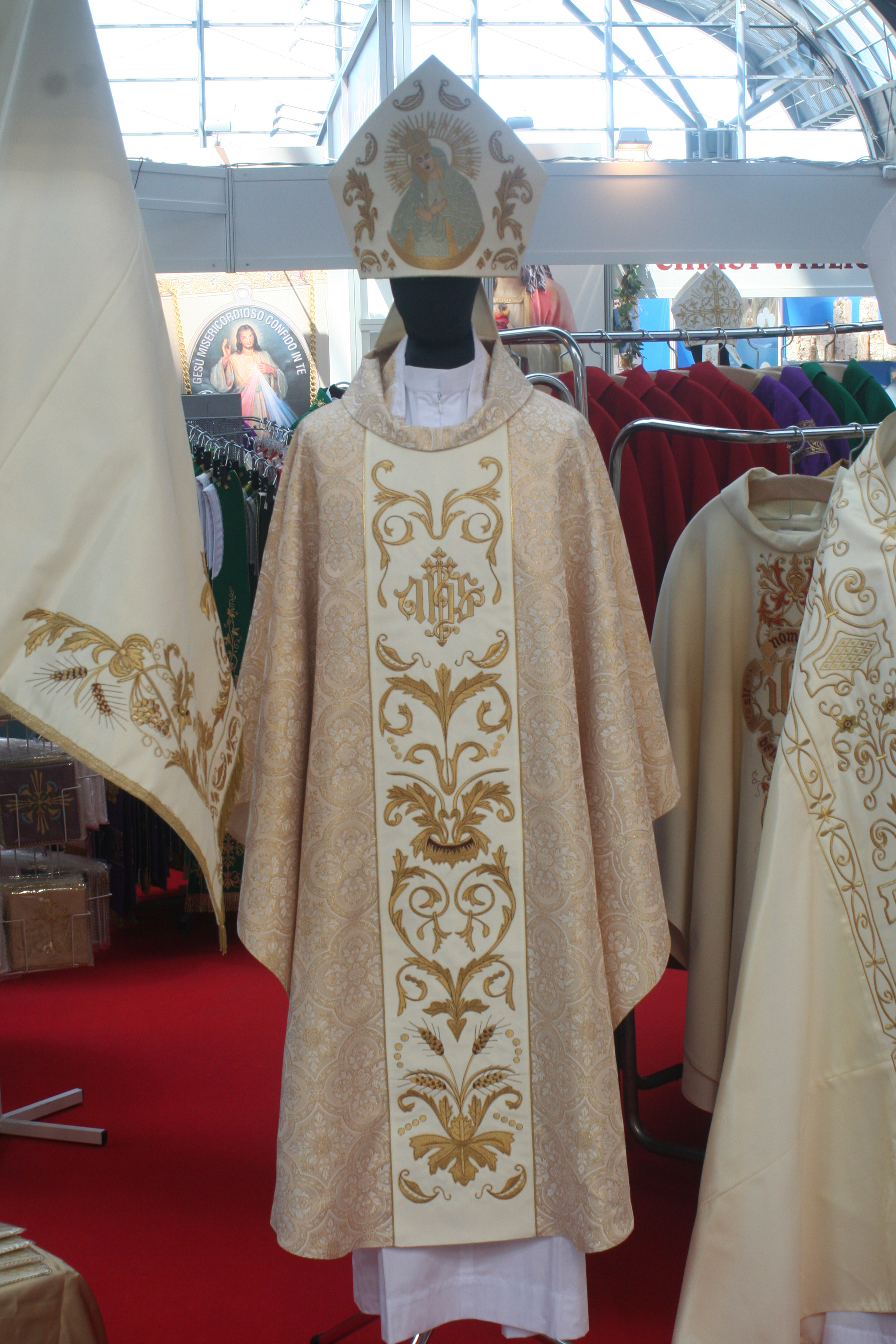 haftowany ornat na stoisku jednej z firm na targach SACROEXPO 2013 w Kielcach